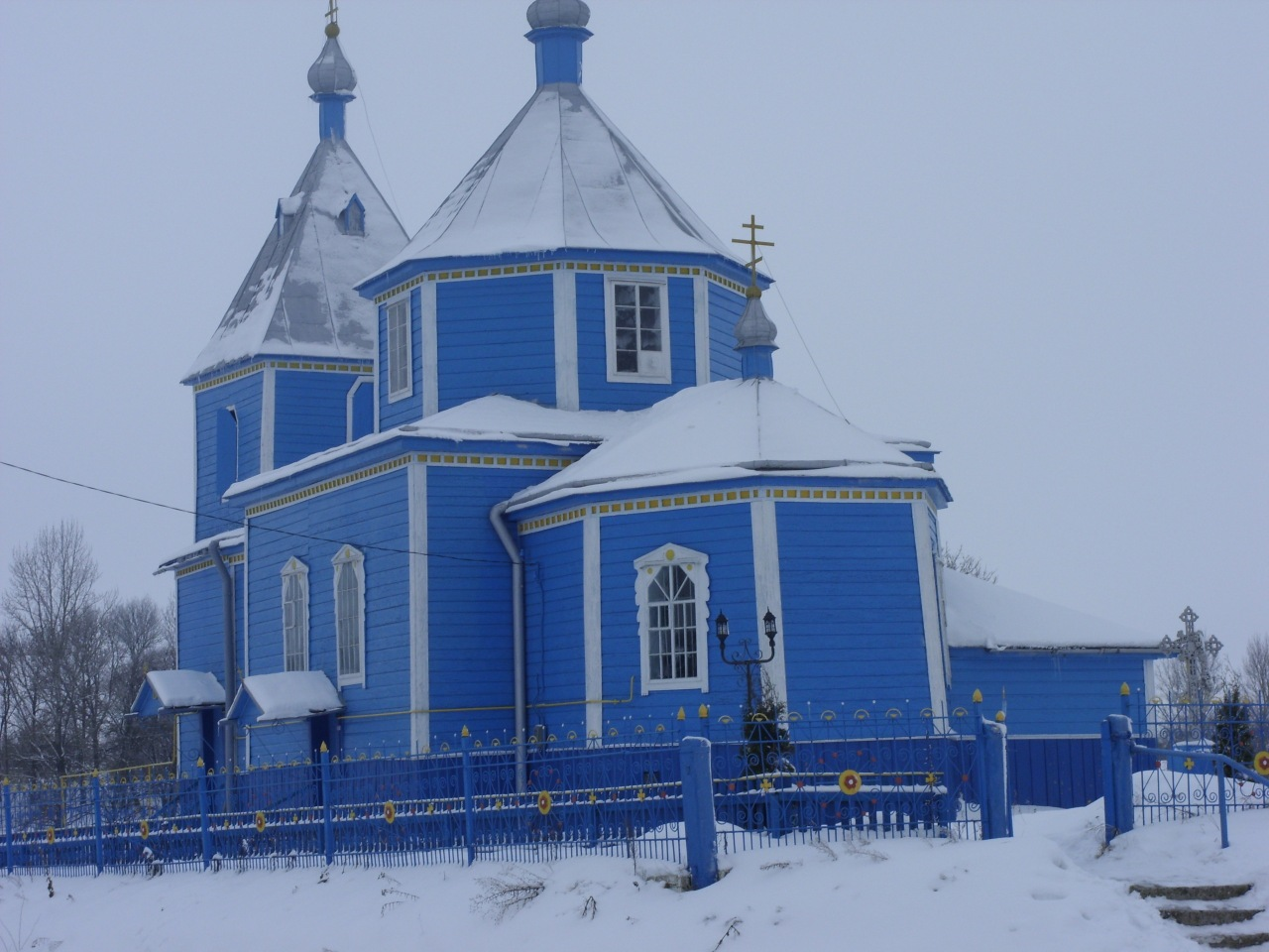 Православний храм. Церква у селі Печихвости